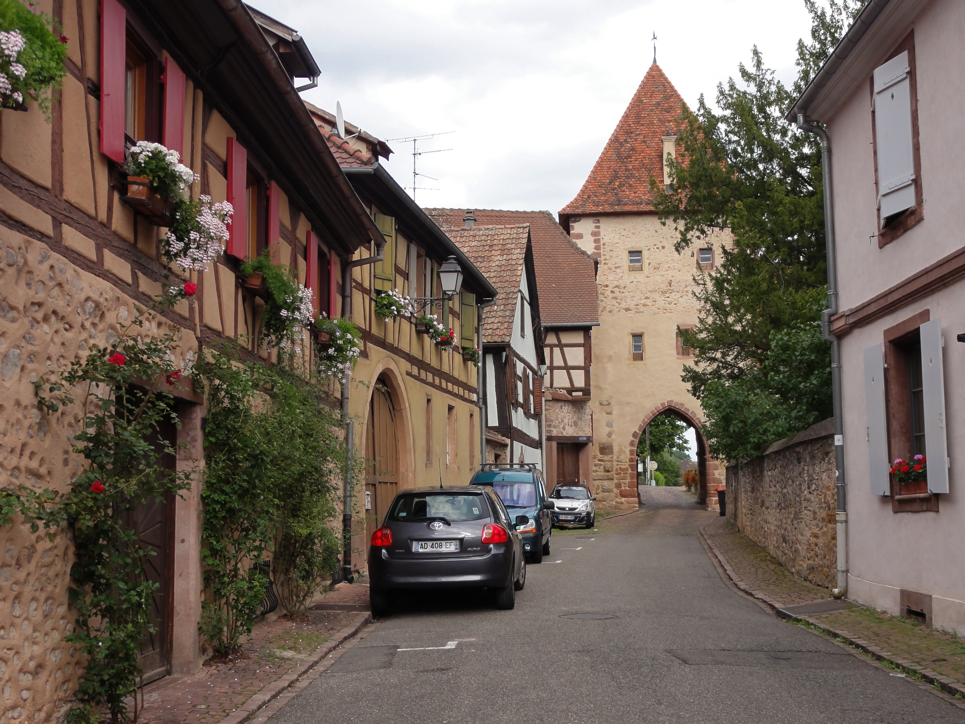 Alsace, Haut-Rhin, Turckheim, Porte Brand ou Brand Tor (1315).